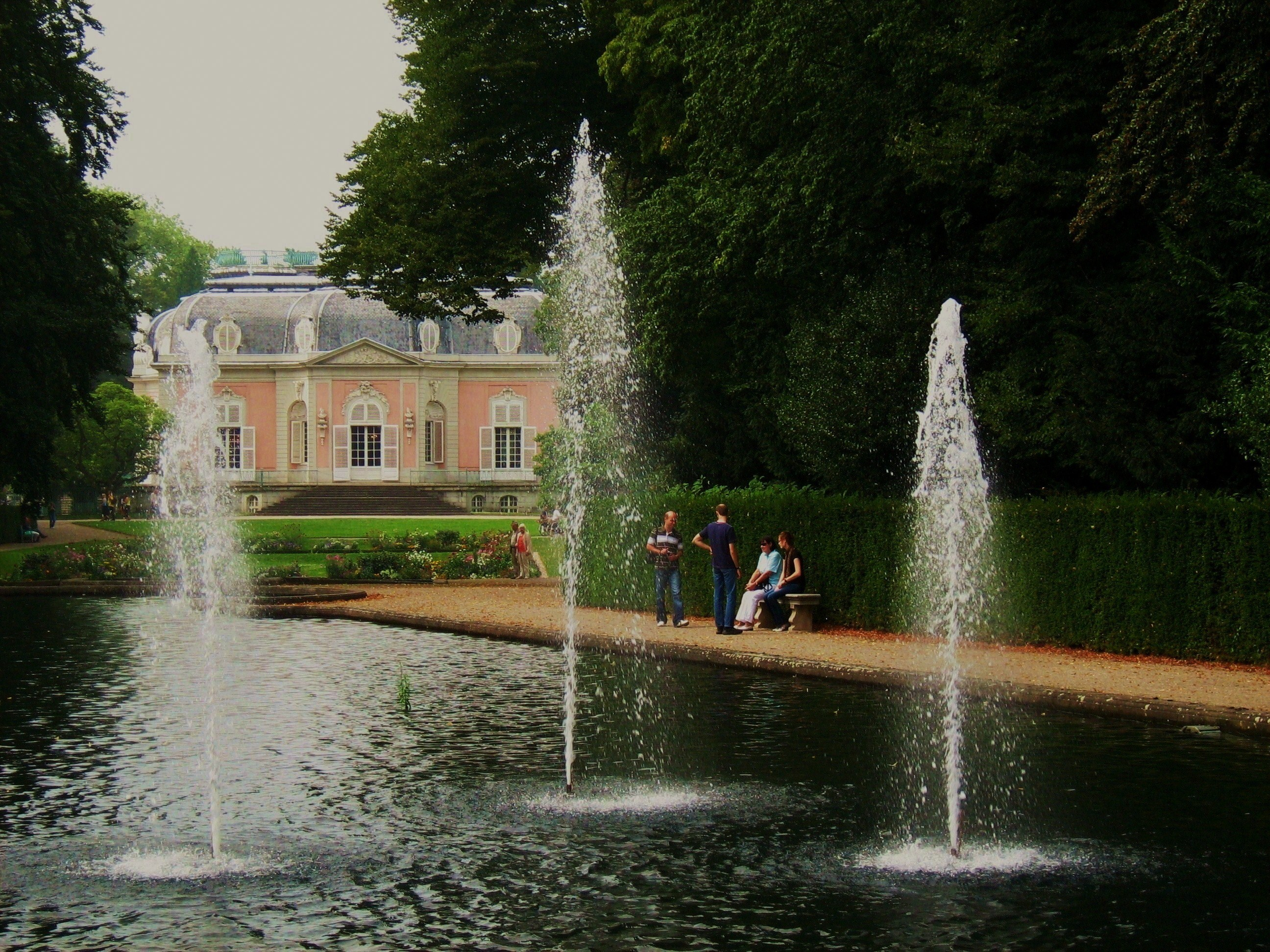 Schloss Benrath Park Ost